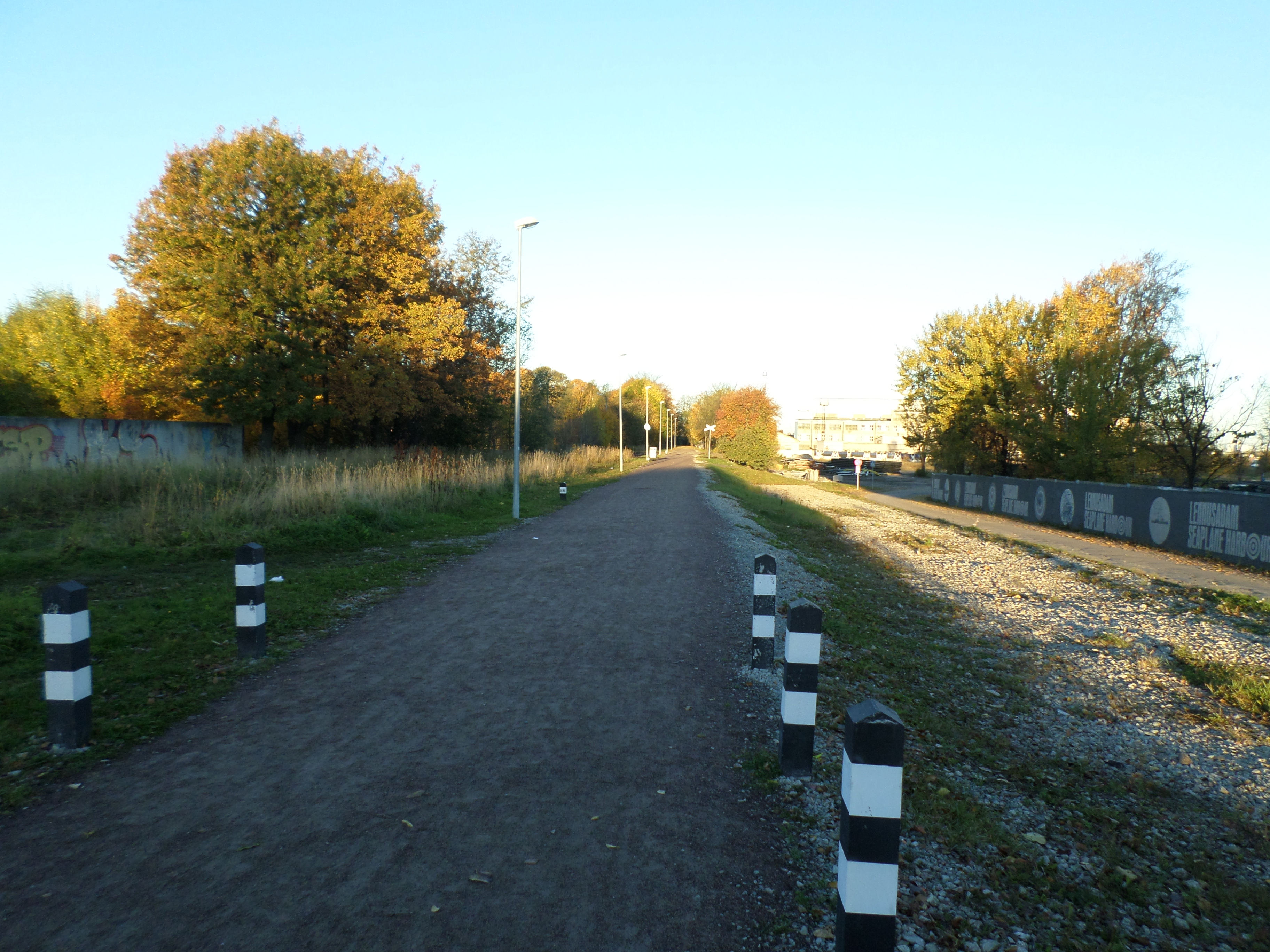 Kultuurikilomeeter